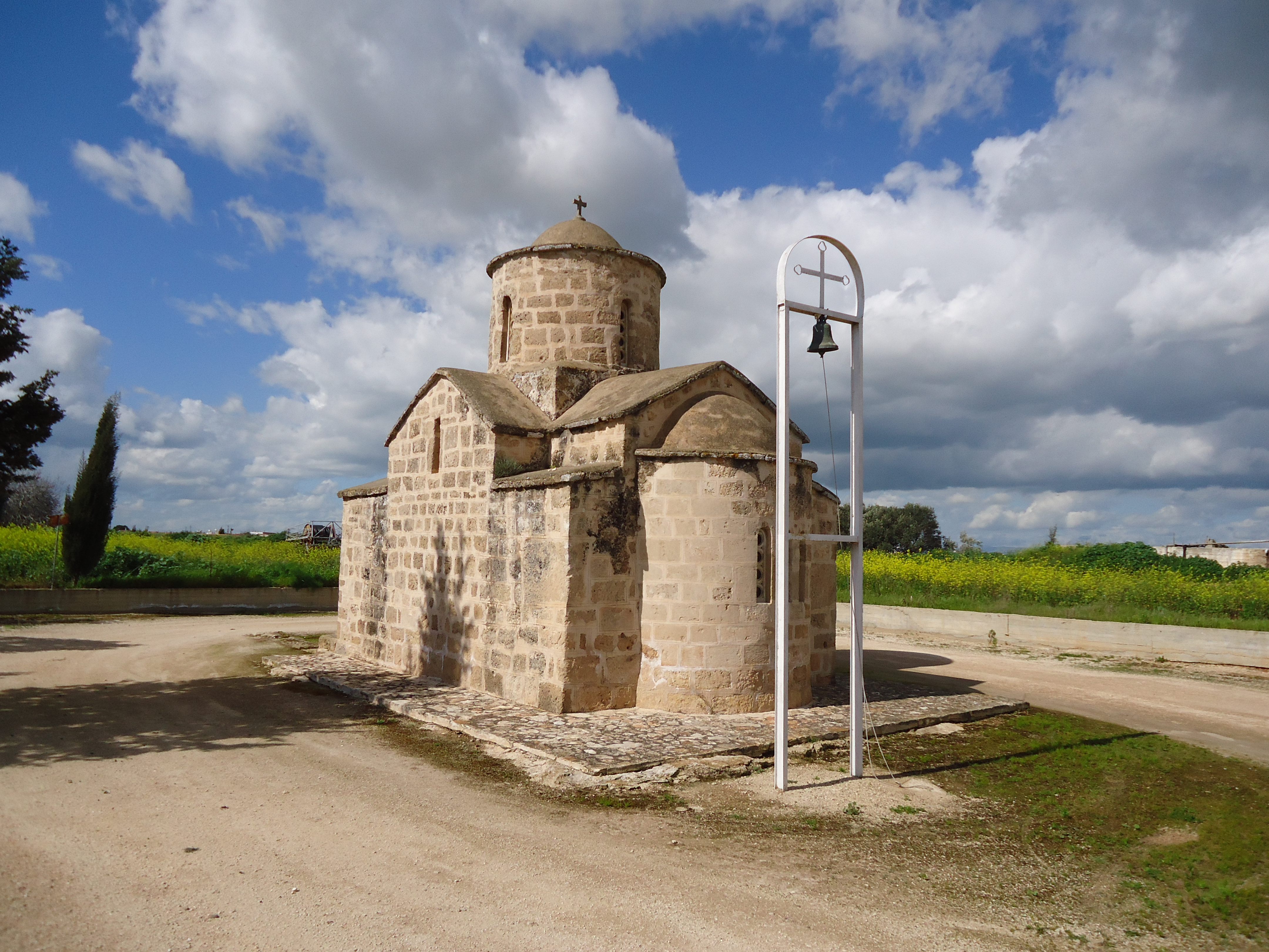 Ναός του αγίου Ανδρονίκου νοτιοανατολική άποψη